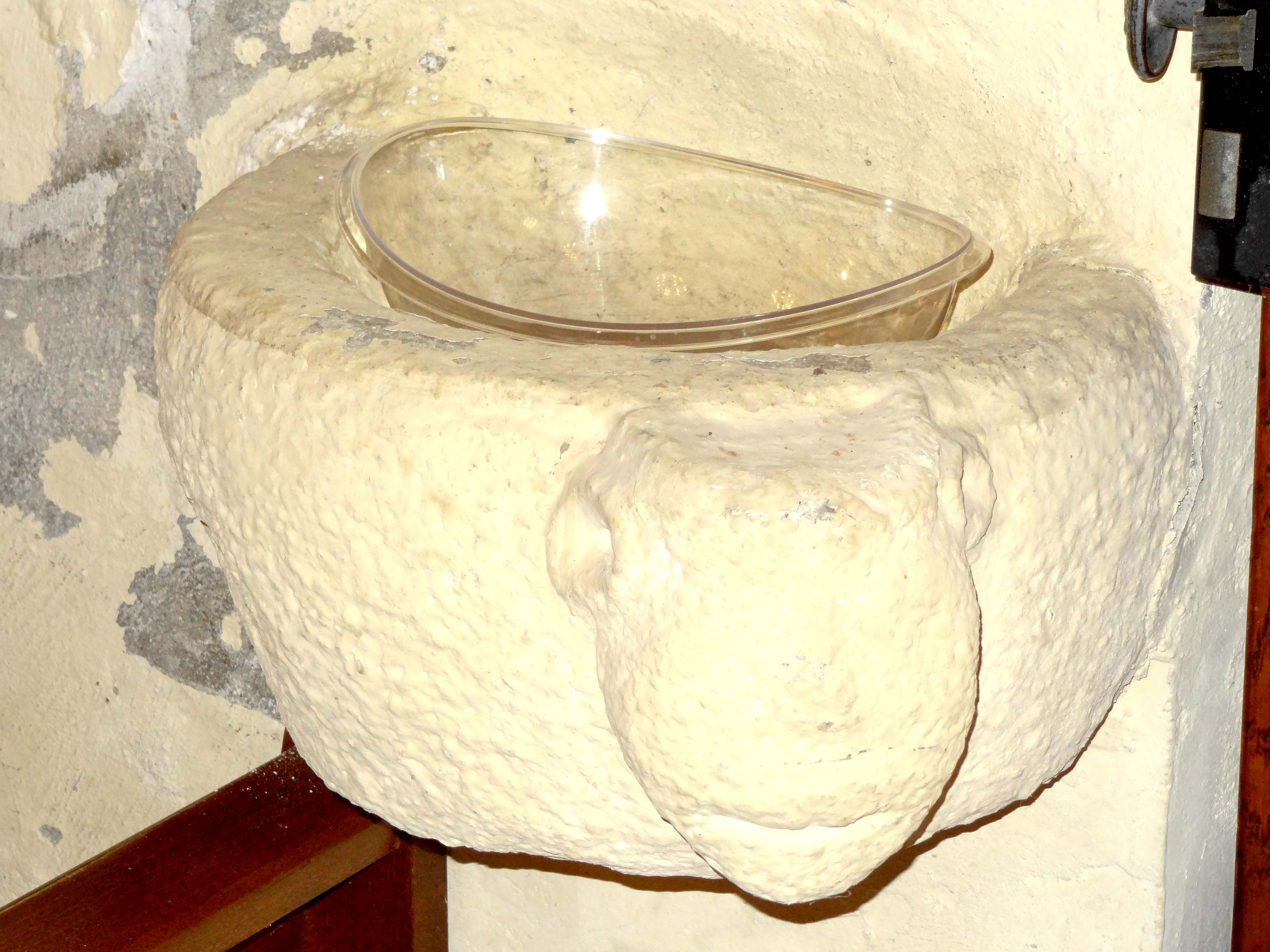 Mobilier de l'église - voir titre.